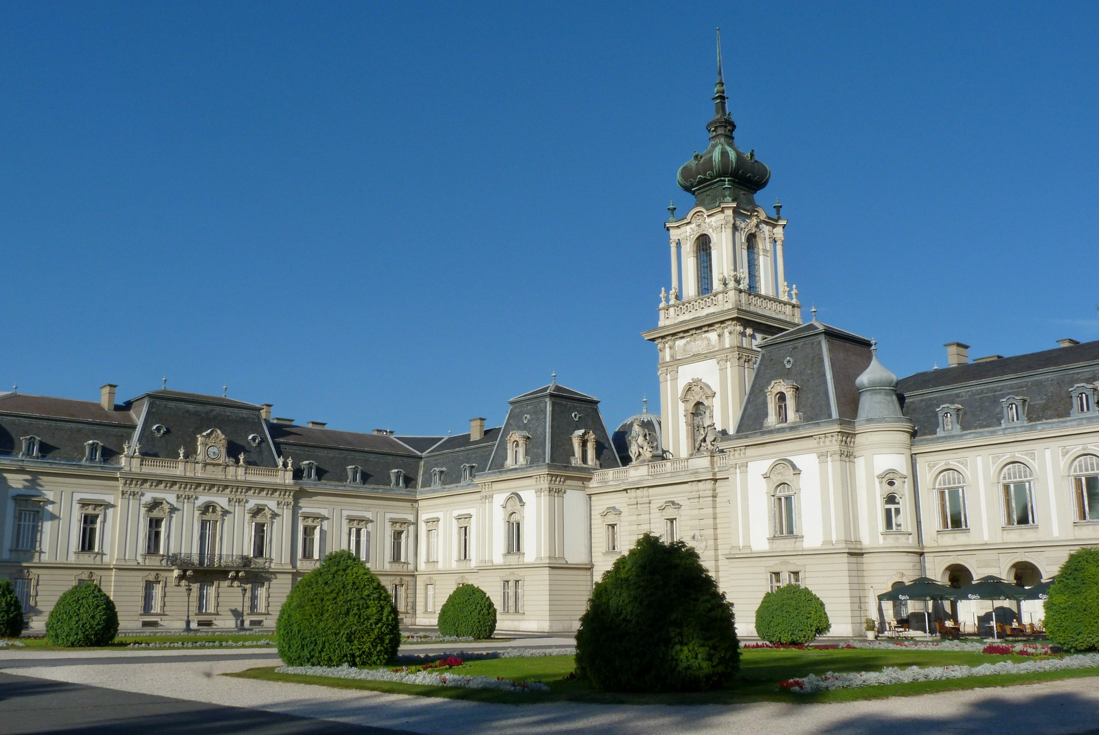 Festetics-kastély (Keszthely, Kastély u. 1 .) This is a photo of a monument in Hungary, Identifier: 10876